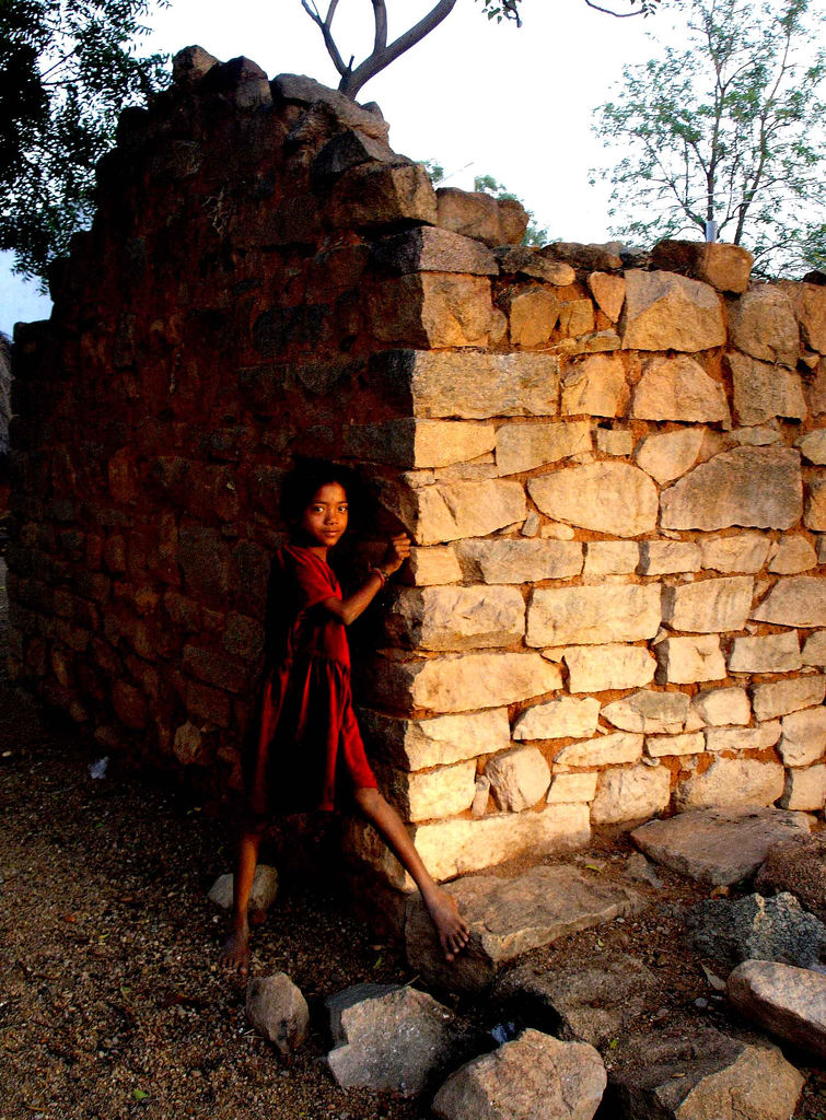 Dalit girl, Andhra Pradesh, India